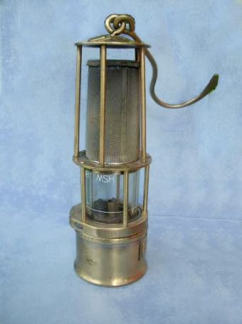 benzinelamp opzichtersuitvoering. eigen foto t.b.v.artikel op site Mijnbouw-Nederlands-Limburg Hiervan ben ik de webmaster